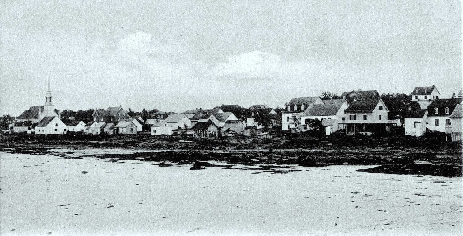 Kamouraska, vue prise du fleuve